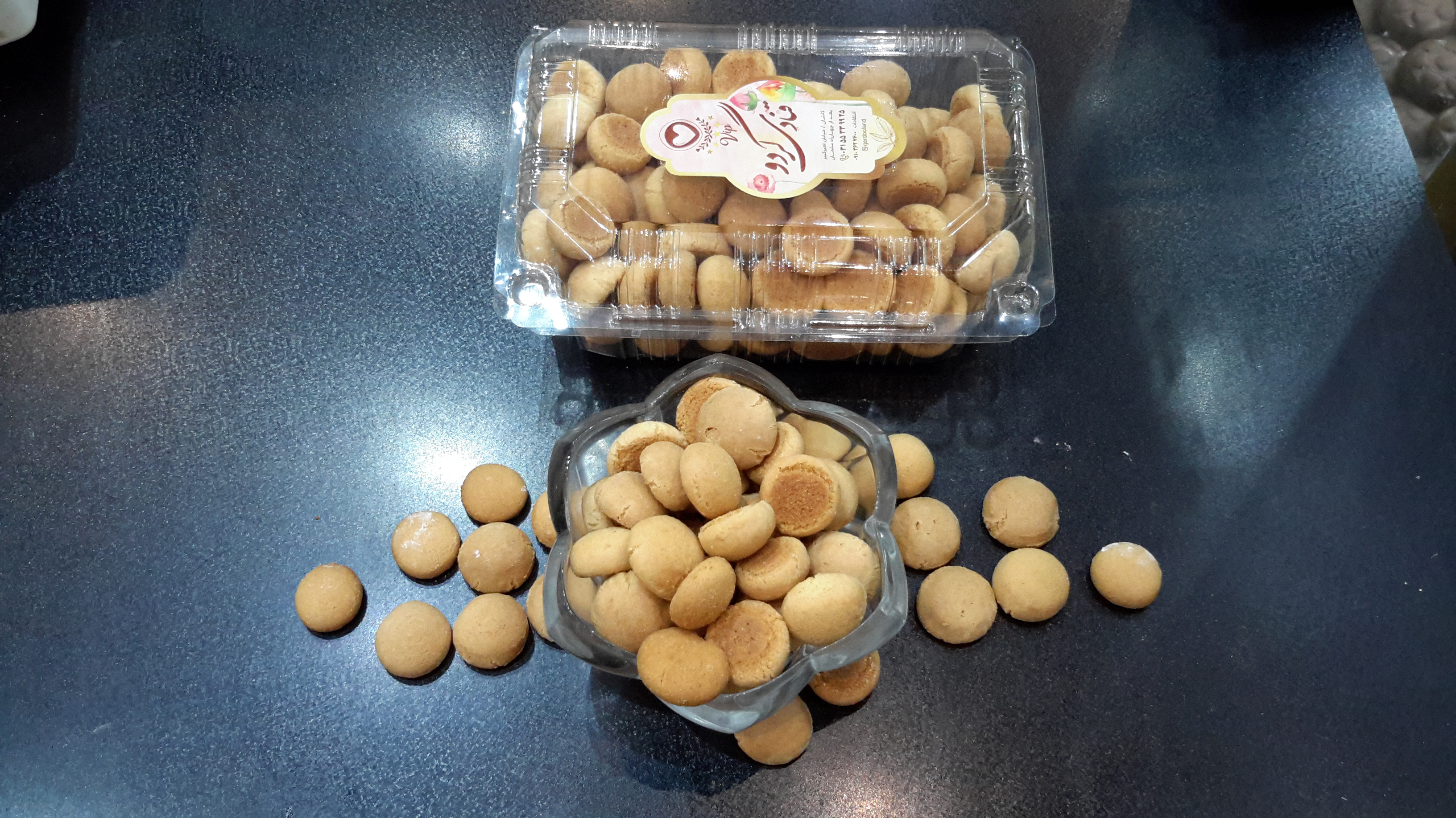 شیرینی حاجی بادام کاشان